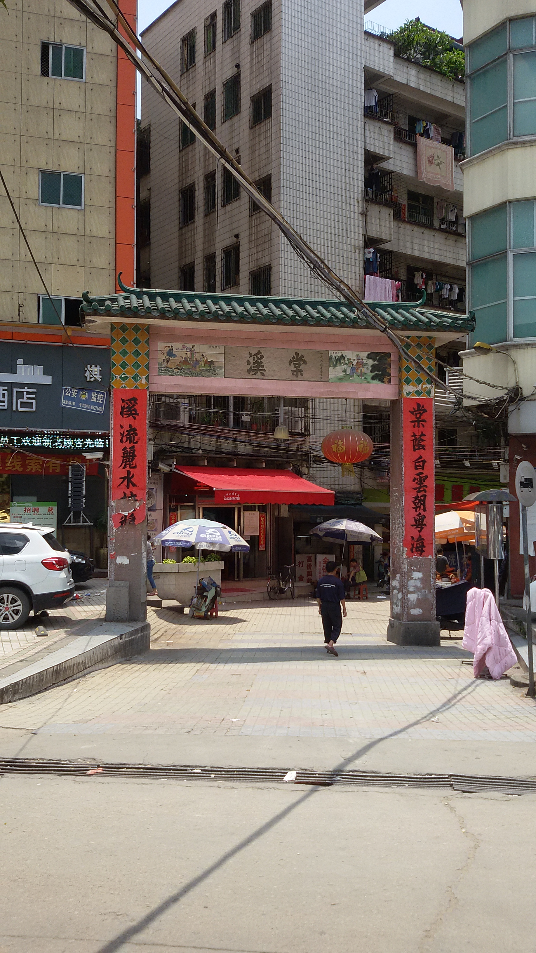 粵語: 廣州市白雲區棠溪嘅牌坊